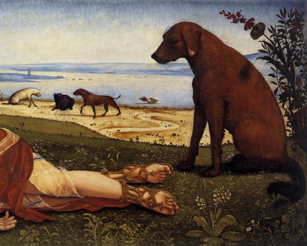 detail